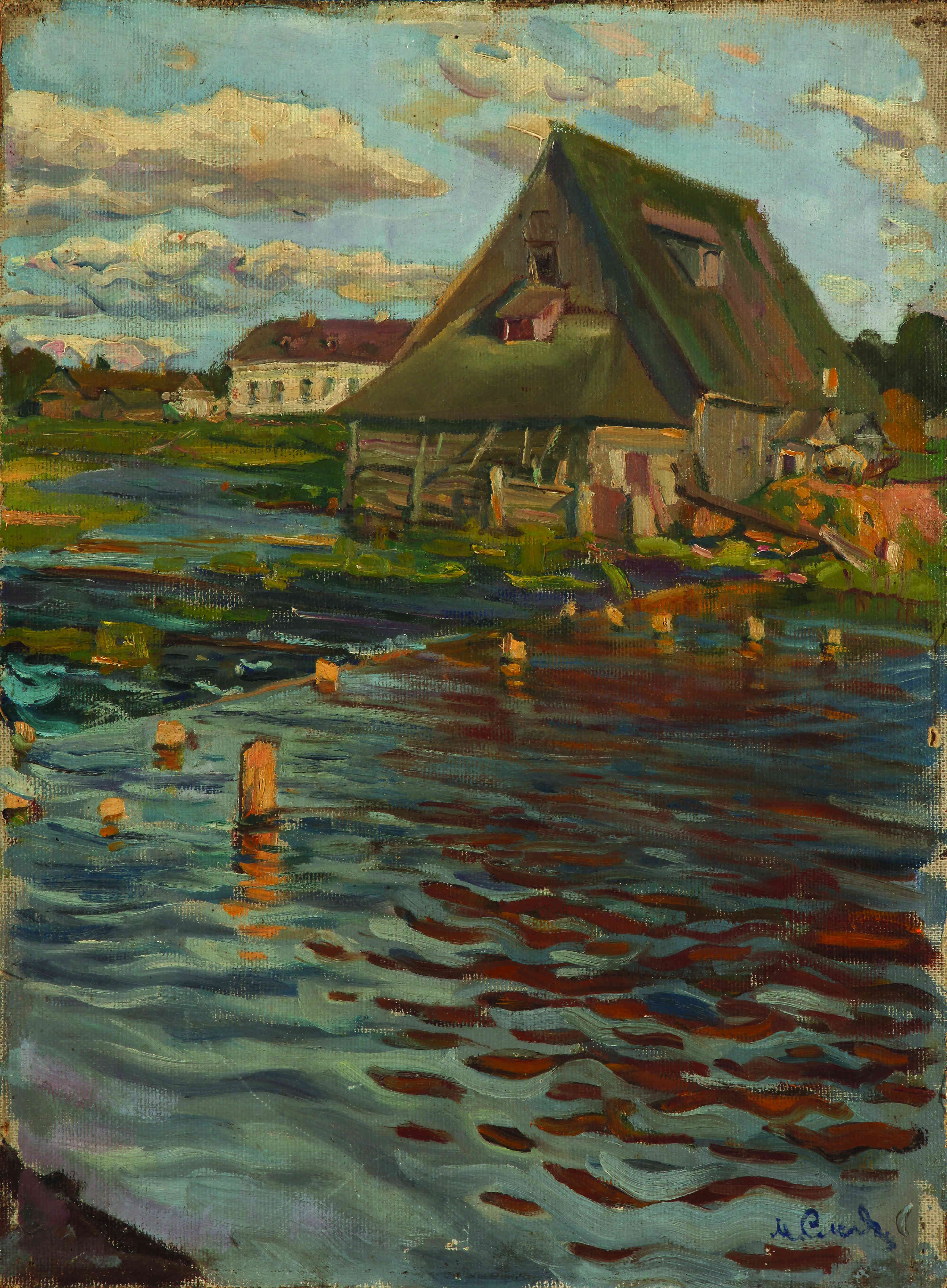 Клебанскі млын Сляпян Майсей, 1925 г. Фанера, палатно, алей 46,5×34,5 см Нацыянальны мастацкі музей Рэспублікі Беларусь